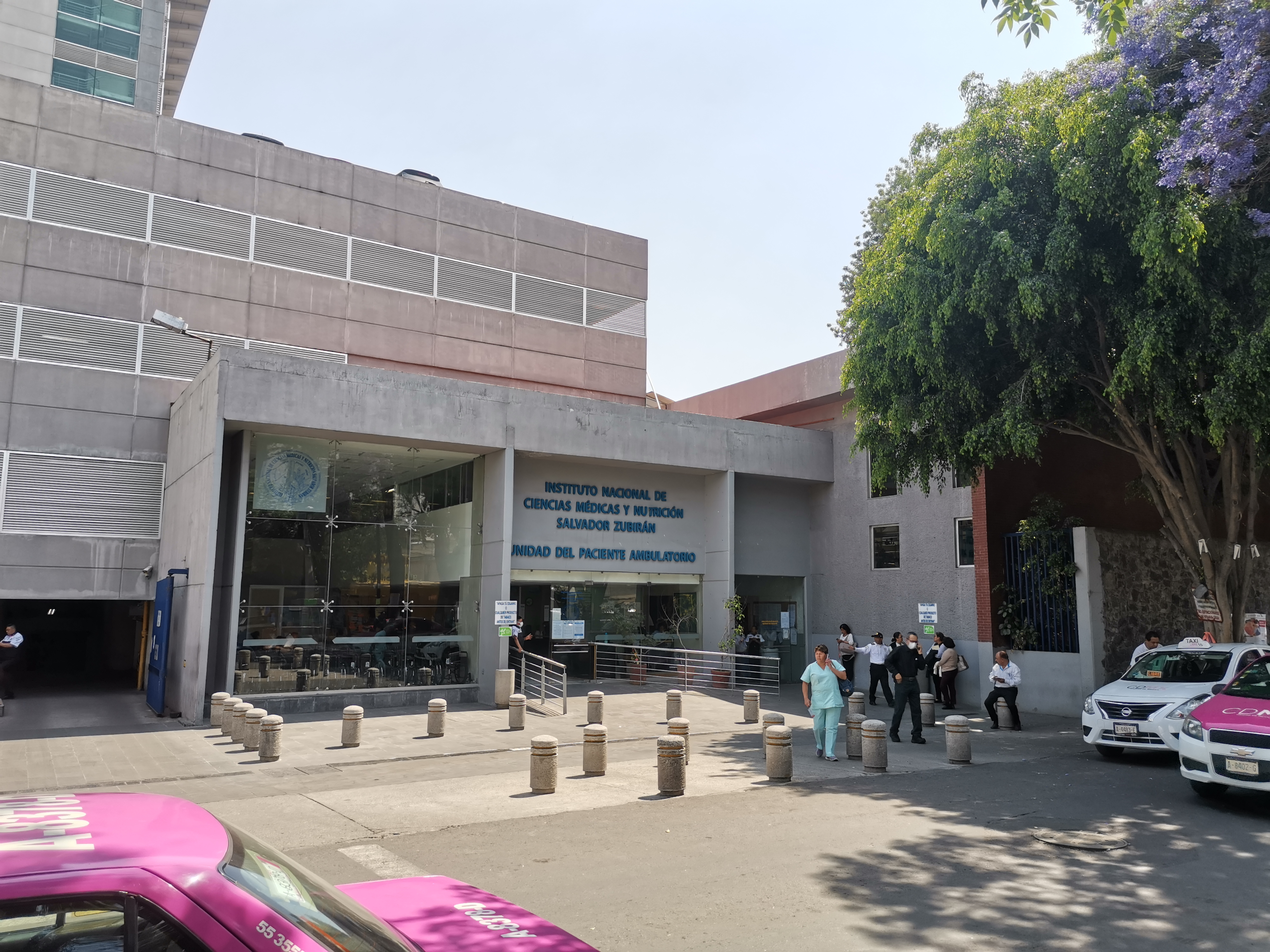 Imagen del acceso de consulta externa del Instituto Nacional de Ciencias Médicas y Nutrición Salvador Zubirán, Ciudad de México.